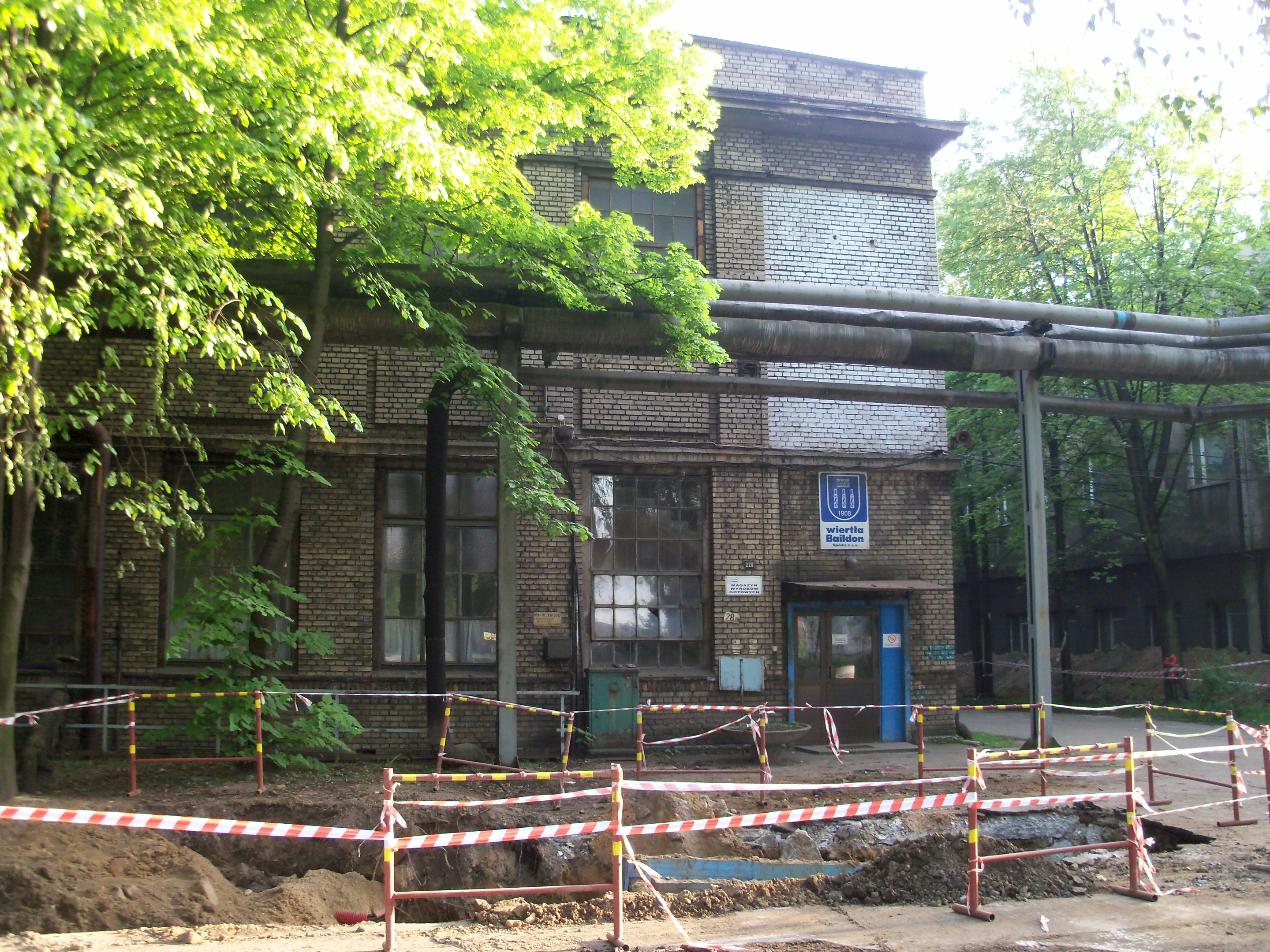 Huta Baildon w Katowicach